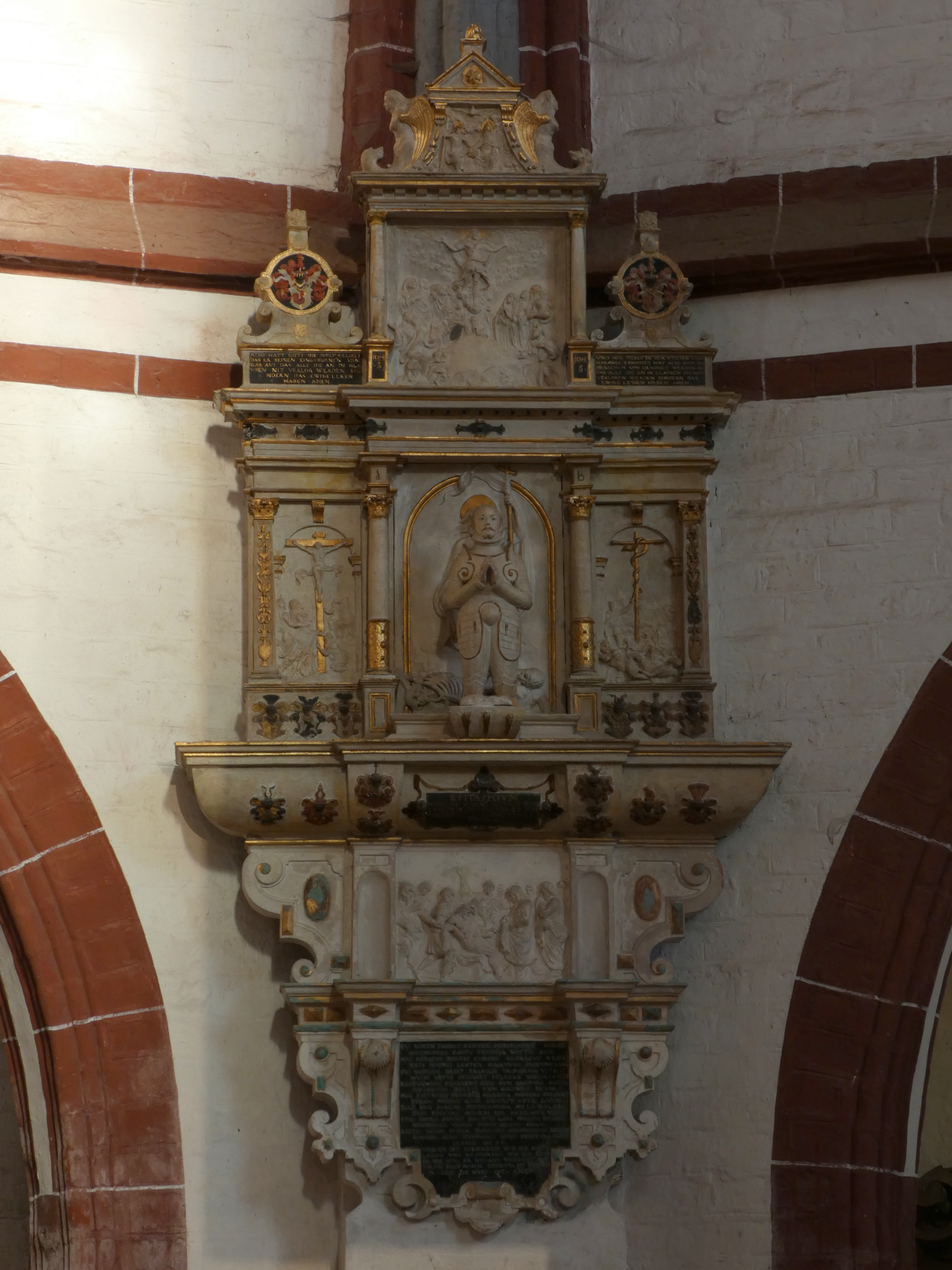 Epitaph Georg Hahn, St. Gotthardt